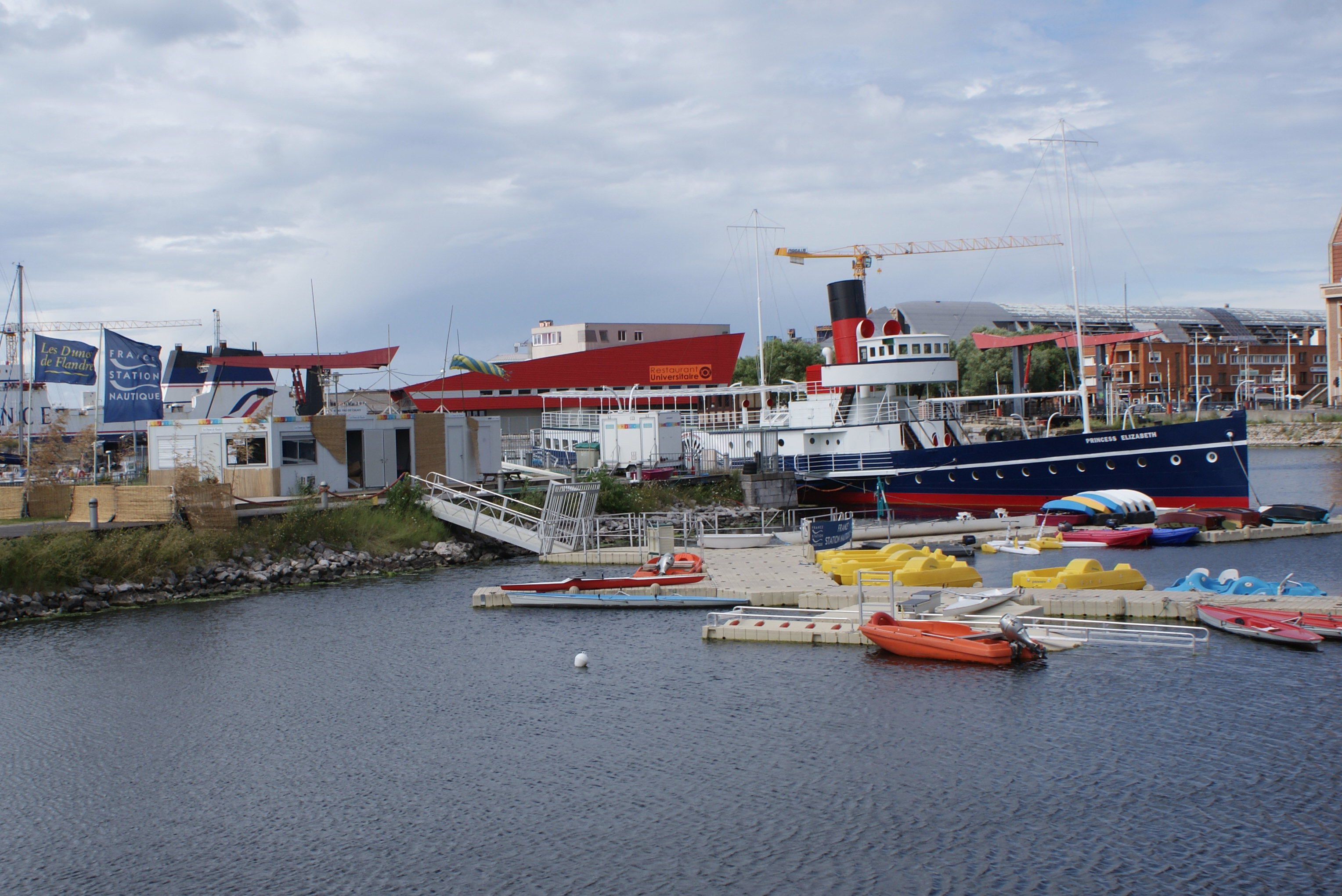 Princess Elizabeth après sa rénovation en juillet 2012 et dans sa nouvelle affectation de base accueil pour l'école de voile- Dunkerque (France)